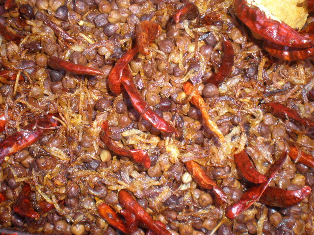 'chola vuna' - taken at the iftari bazar at chawkbazar, dhaka.